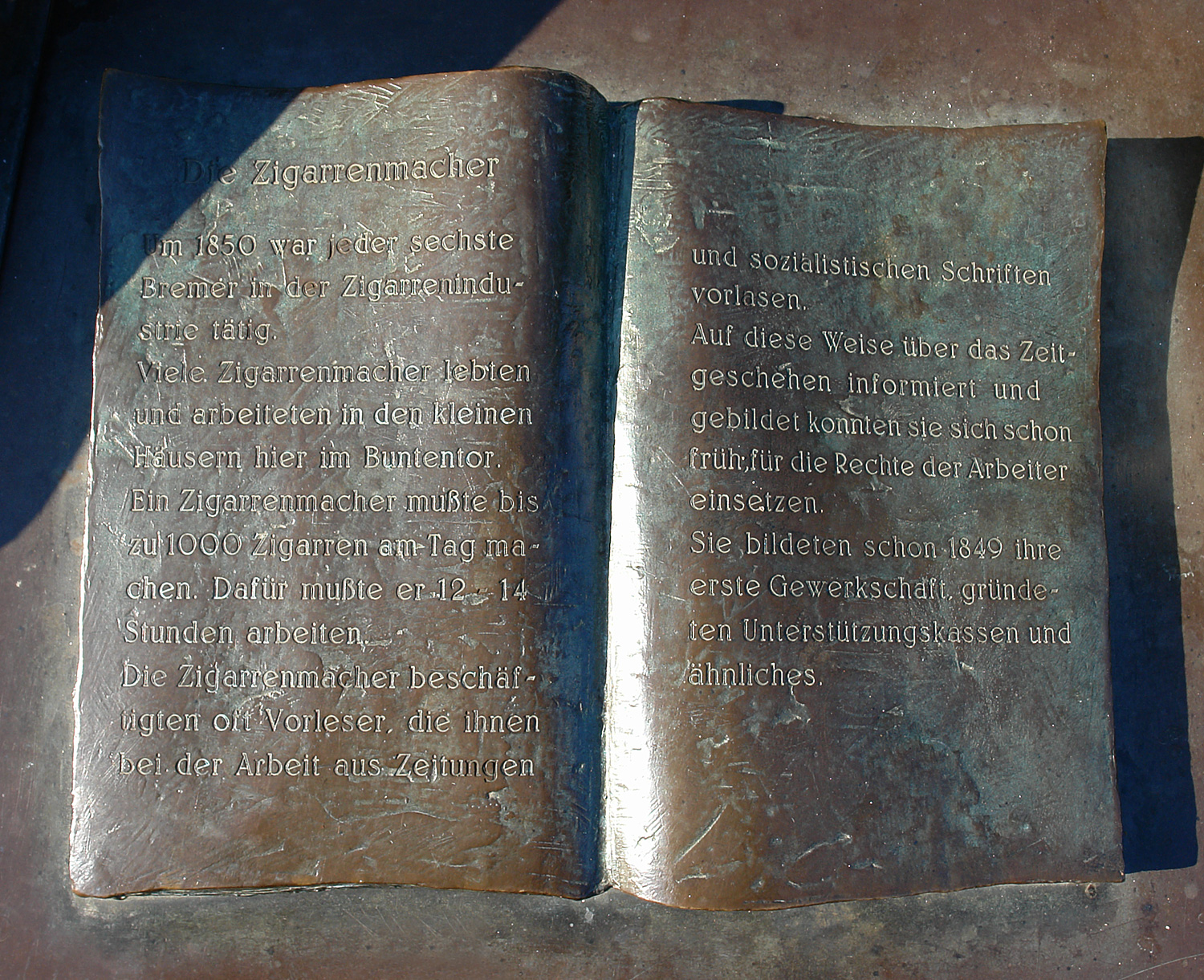 Zigarrenmacher. An einem Tisch sitzen fünf Zigarrenmacher, vor ihnen liegt ein aufgeschlagenes Buch, auf welchem etwas über das Leben und die schweren Arbeitsbedingungen des Berufsstandes zu lesen ist. Aufstellungsort: Buntentorsteinweg. Errichtet: 1984. Material: Halbfiguren, Bronze, 1,85 m x 3,5 m x 0,75 m. Entwurf und Ausführung: Holger Voigts k: kunst im öffentlichen raum bremen